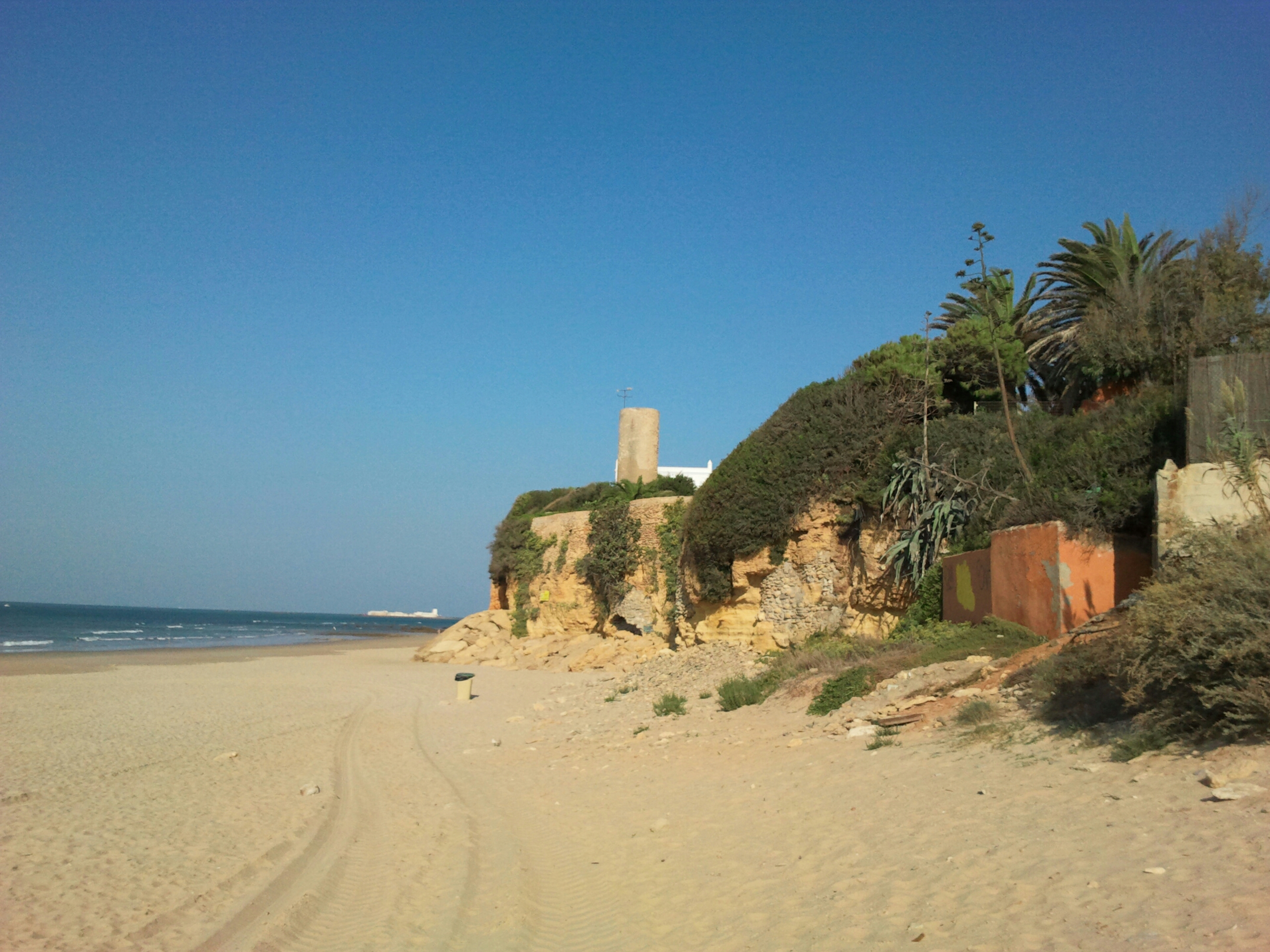 Torre Bermeja, playa de la barrosa, chiclana de la frontera